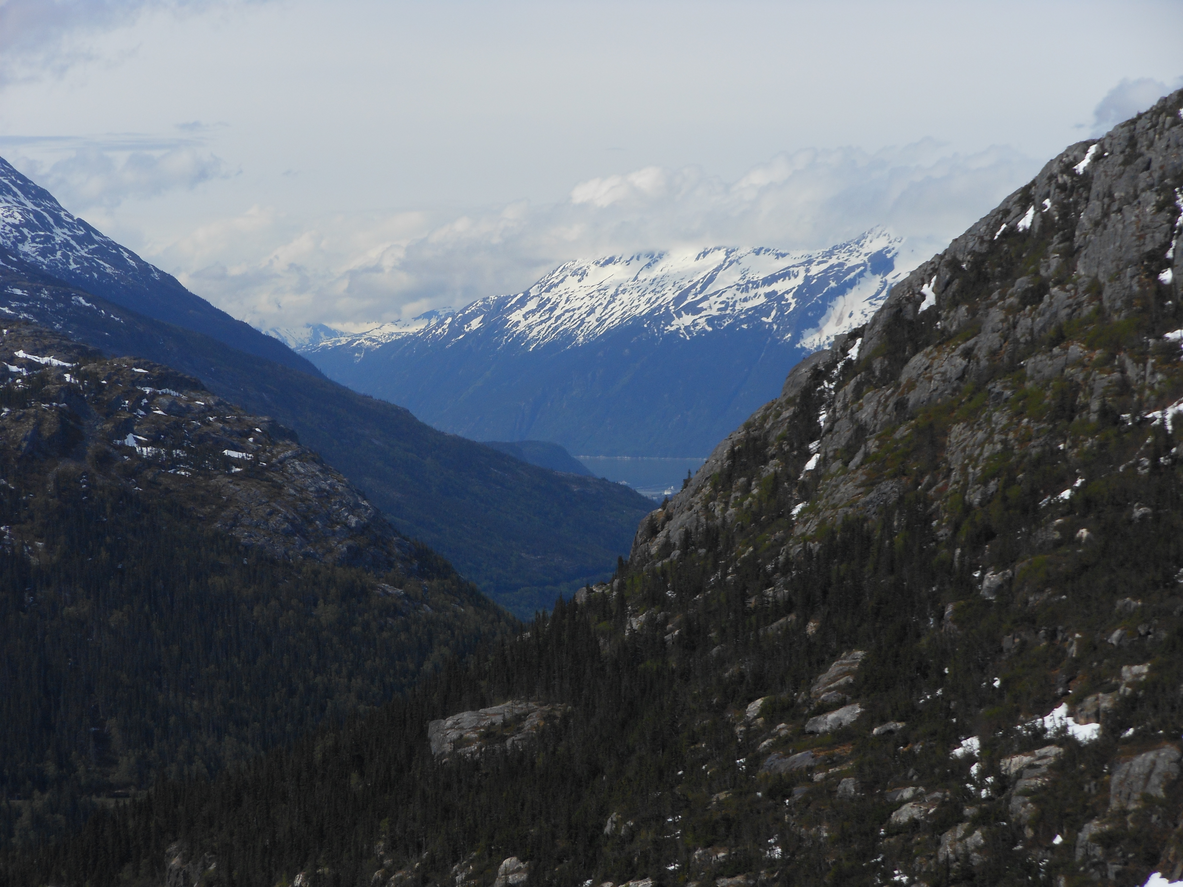 Stikine Region, BC, Canada